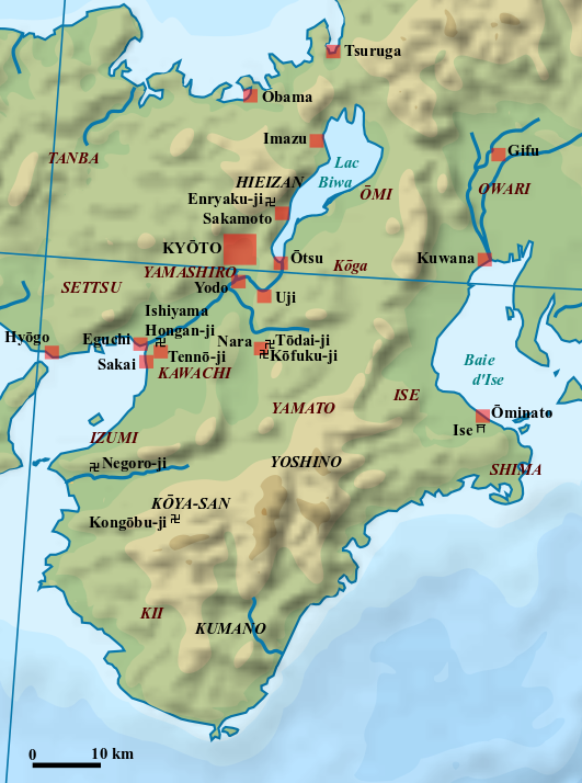 Carte du Kinai à l'époque Sengoku (v. 1467-1570) : agglomérations principales, temples et sanctuaires.